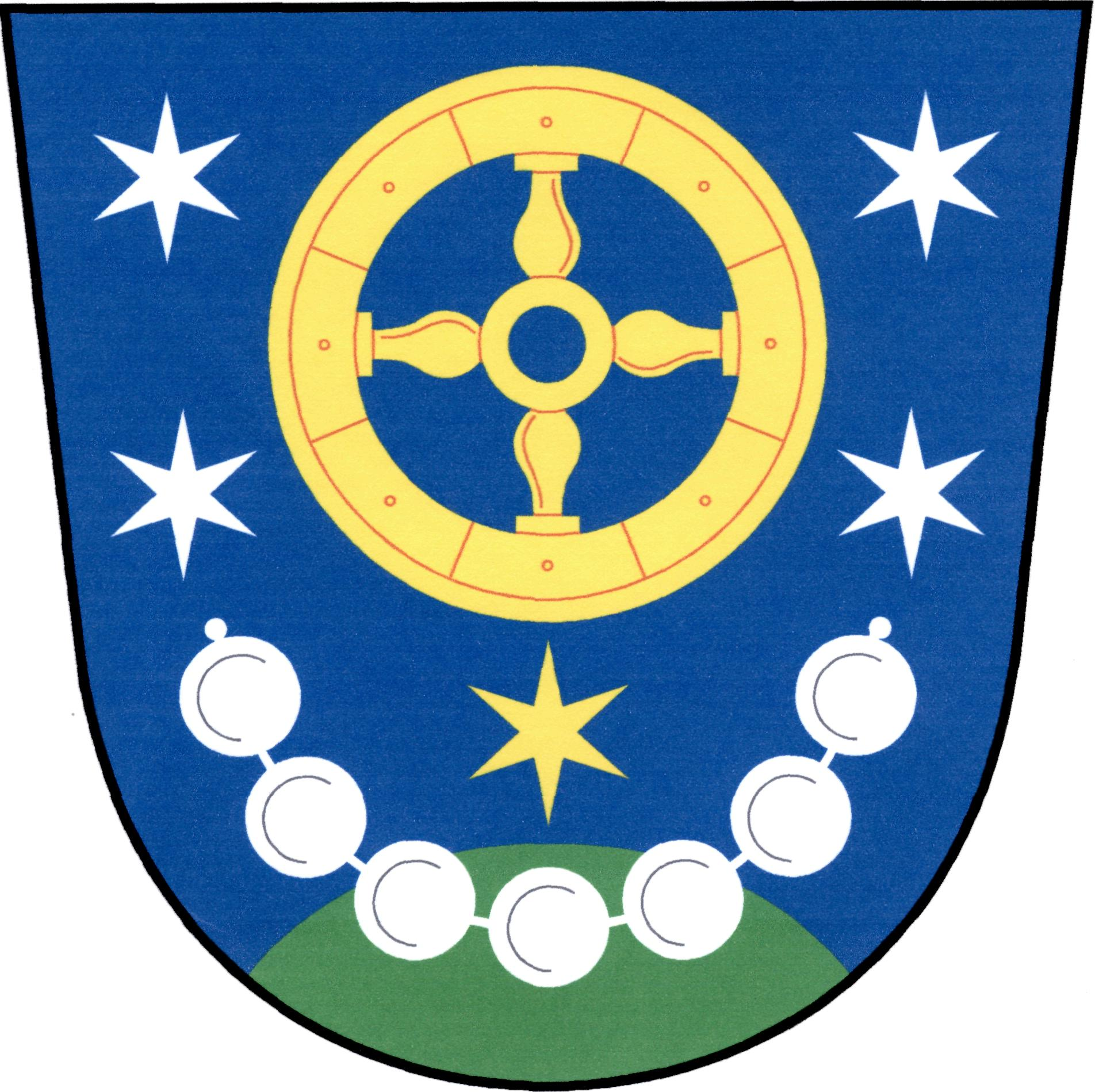 Znak obce Dlažov